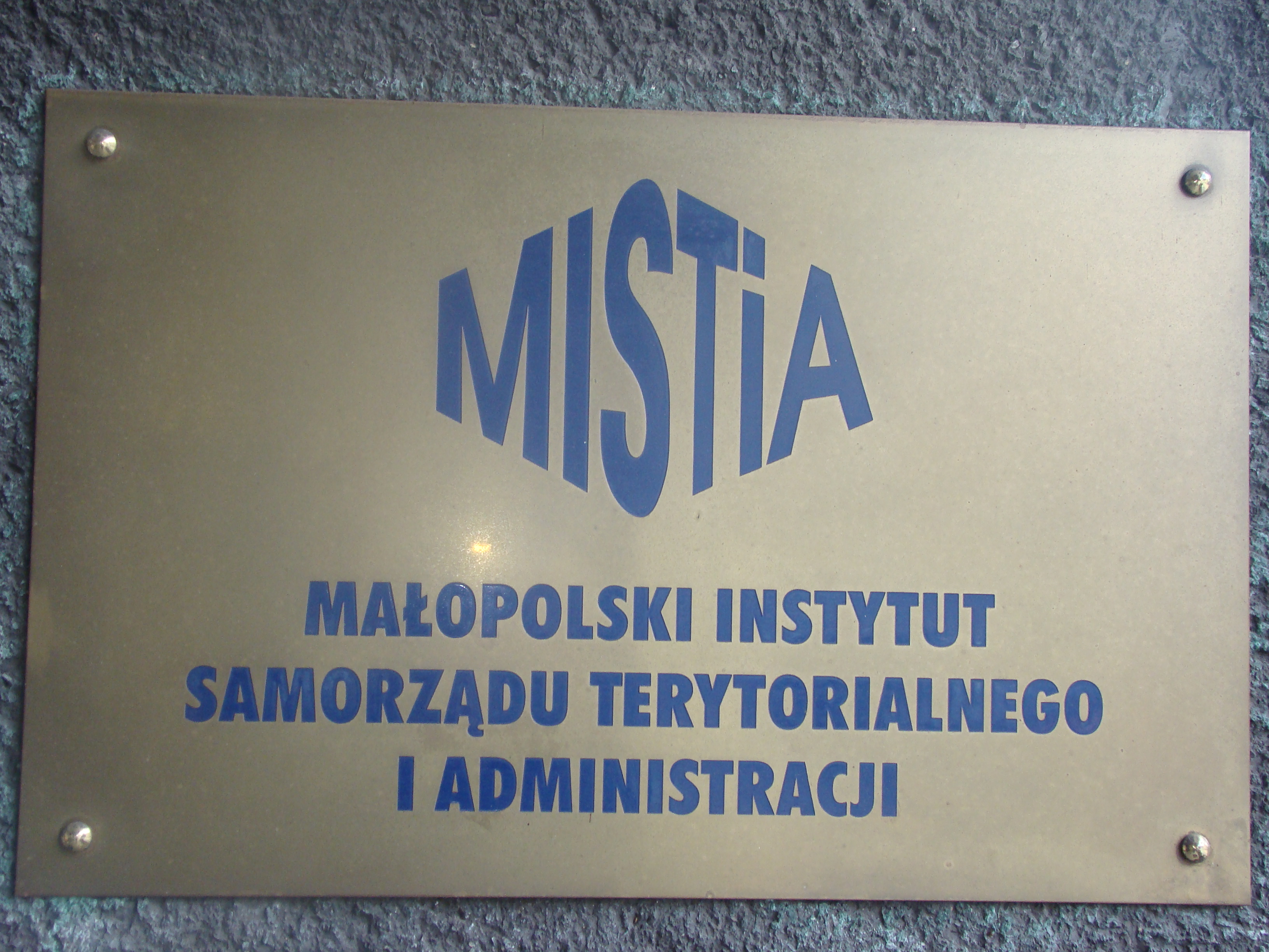 Tablica z logiem MISTiA